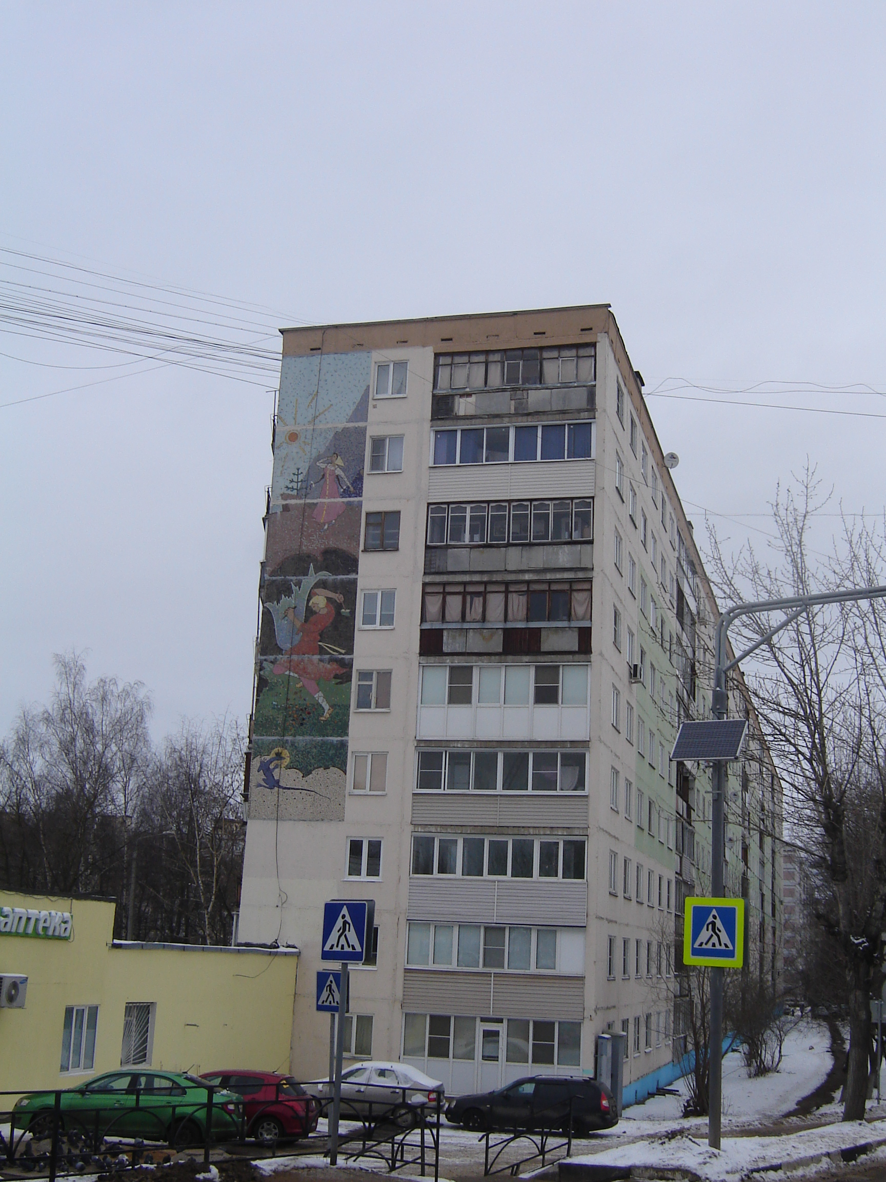 Дом, возведённый из панелей Дмитровского домостроительного комбината